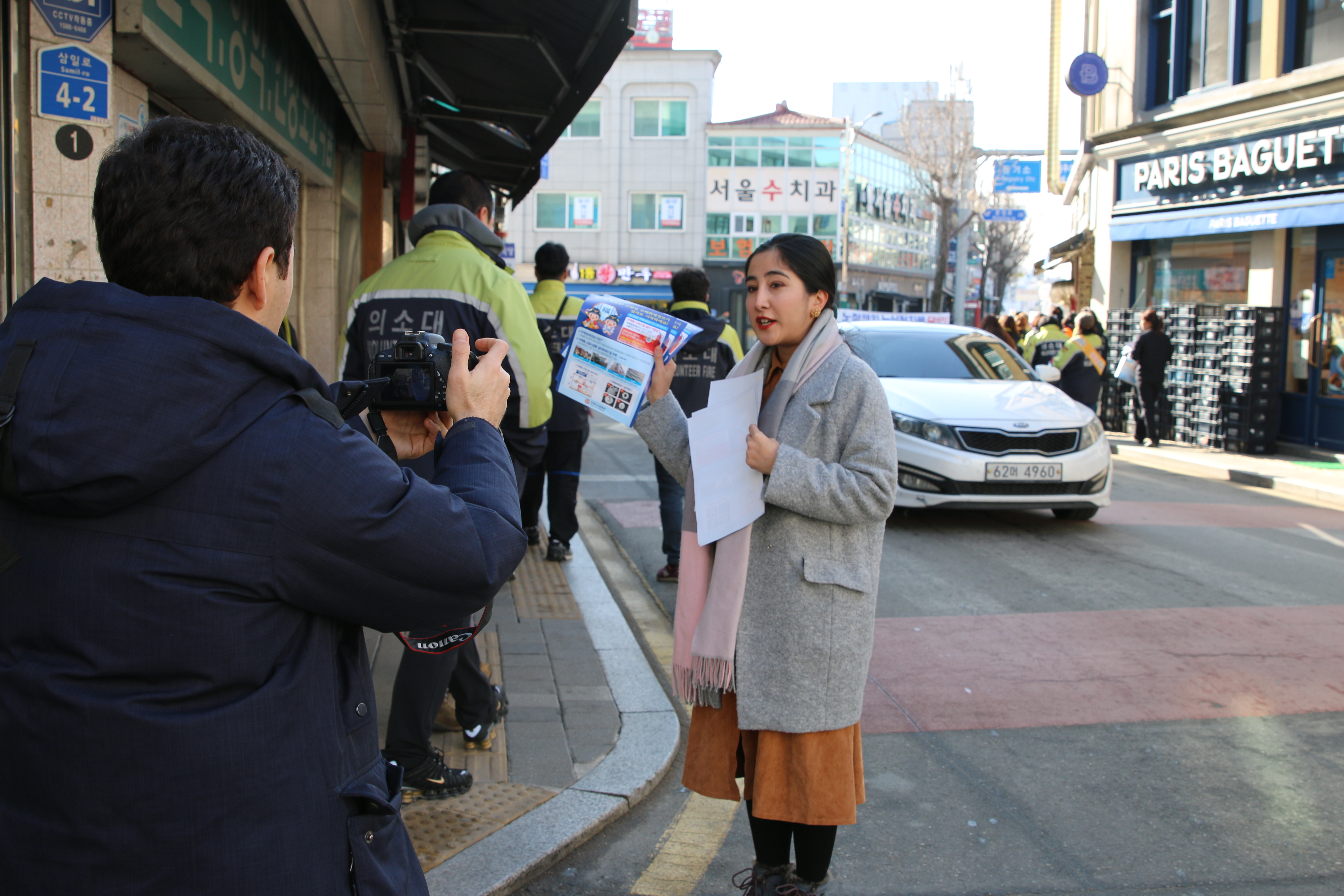 2020년 우즈베키스탄 kun.uz 기자 Feruza Avazova Alisherovna 횡성소방서 취재